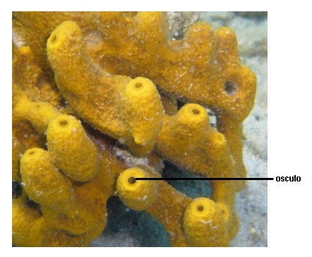 Osculi di Aplysina aerophoba